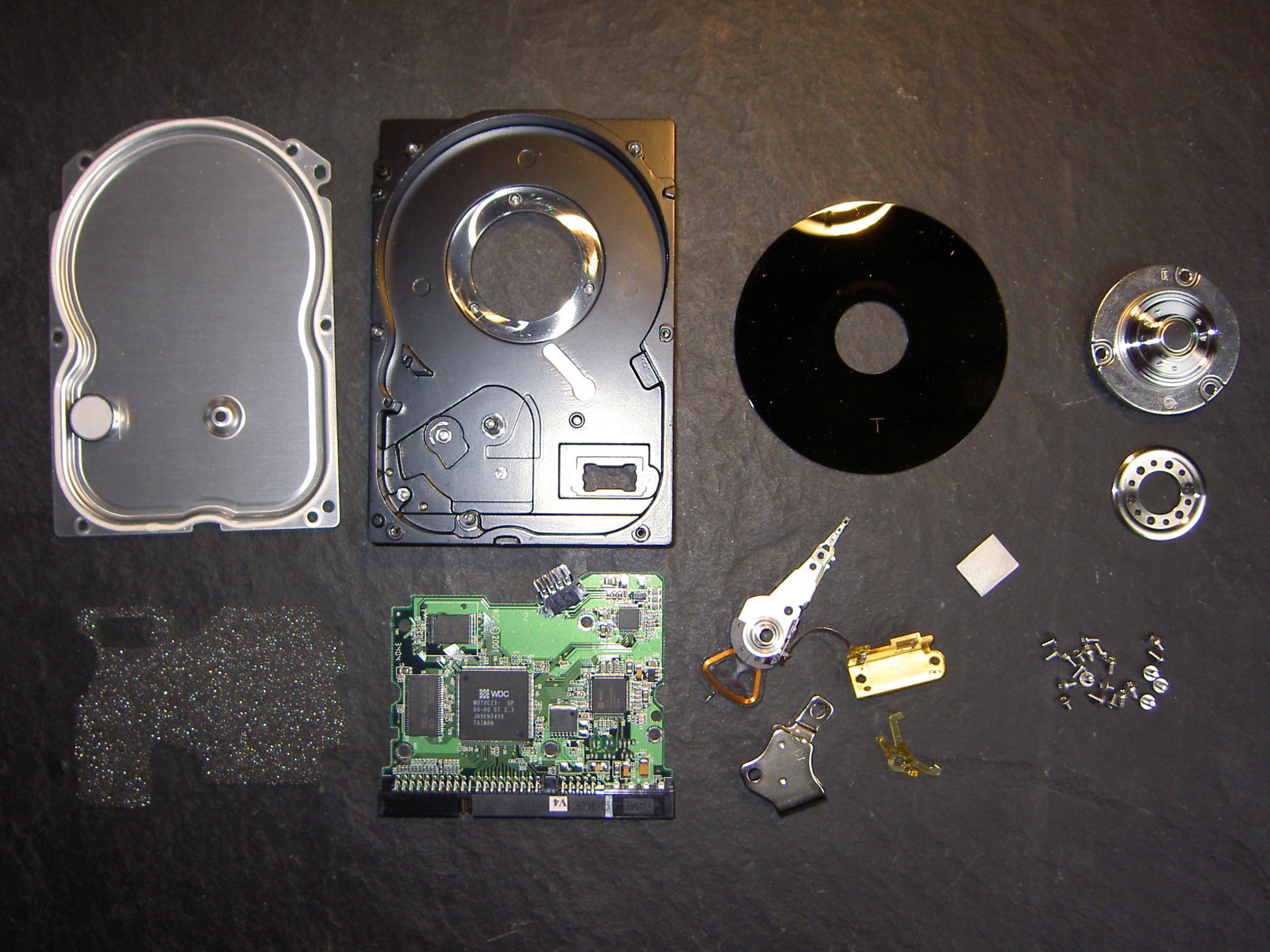 de: Festplatte (8GB) in ihre kompletten Einzelteile zerlegt. en: Hard disk (8GB) seperated into its individual parts. es Disco duro de (8GB) separado en sus componentes individuales.